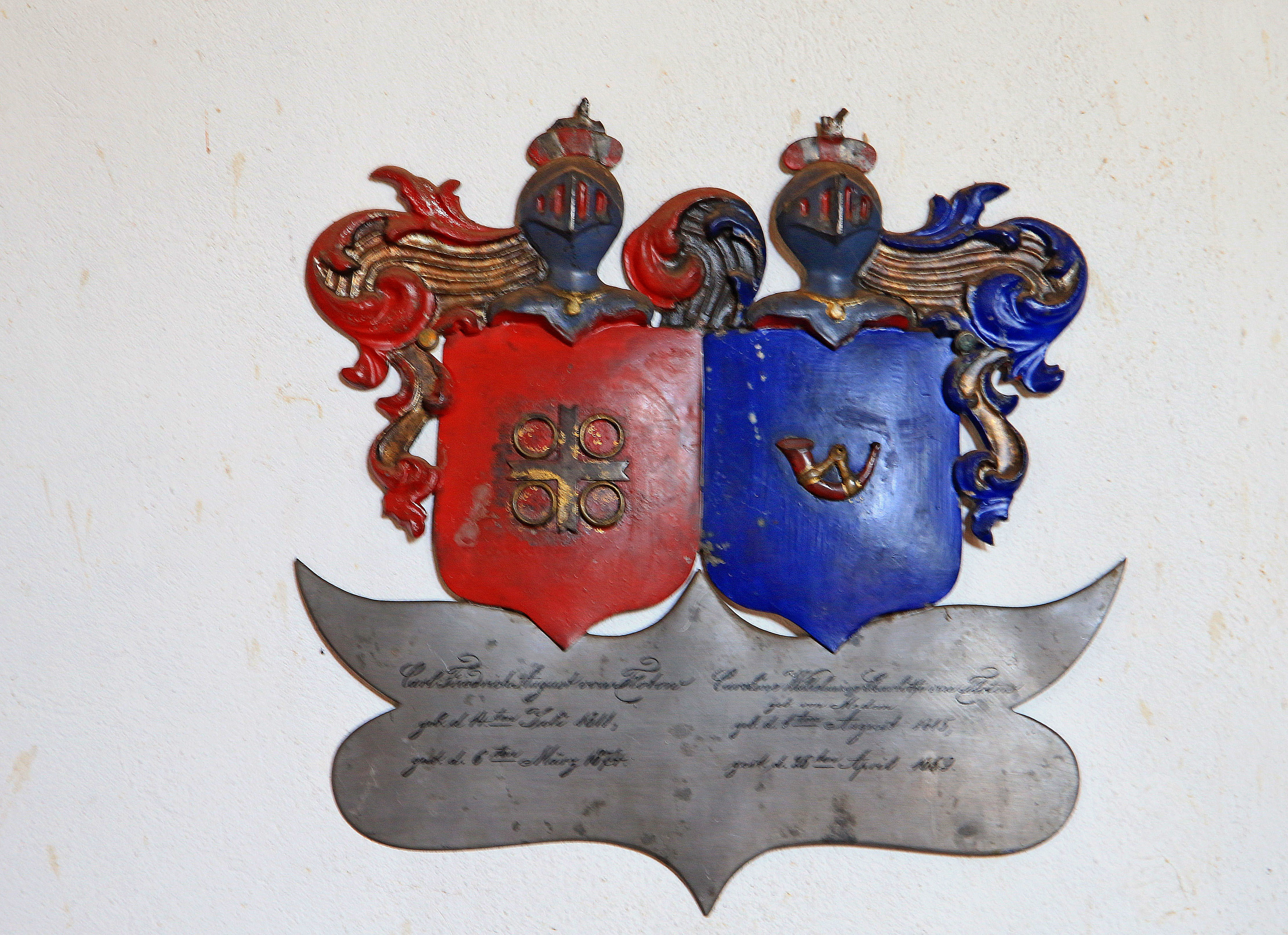 Sargbeschlag mit Doppelwappen der Familie v. Flotow in der Stuerschen Kirche